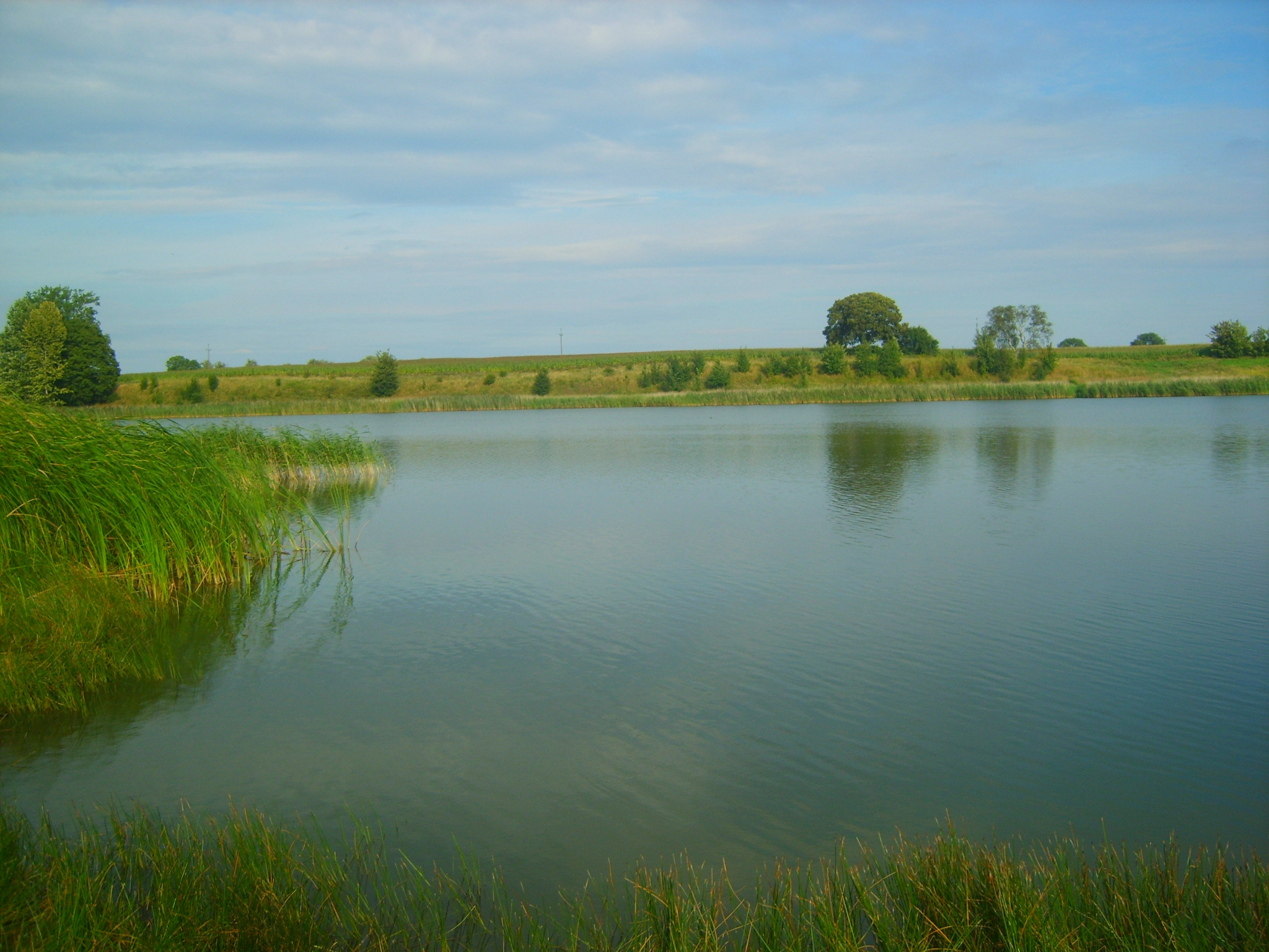 Jezioro Proboszczowskie w Zakrzewie.